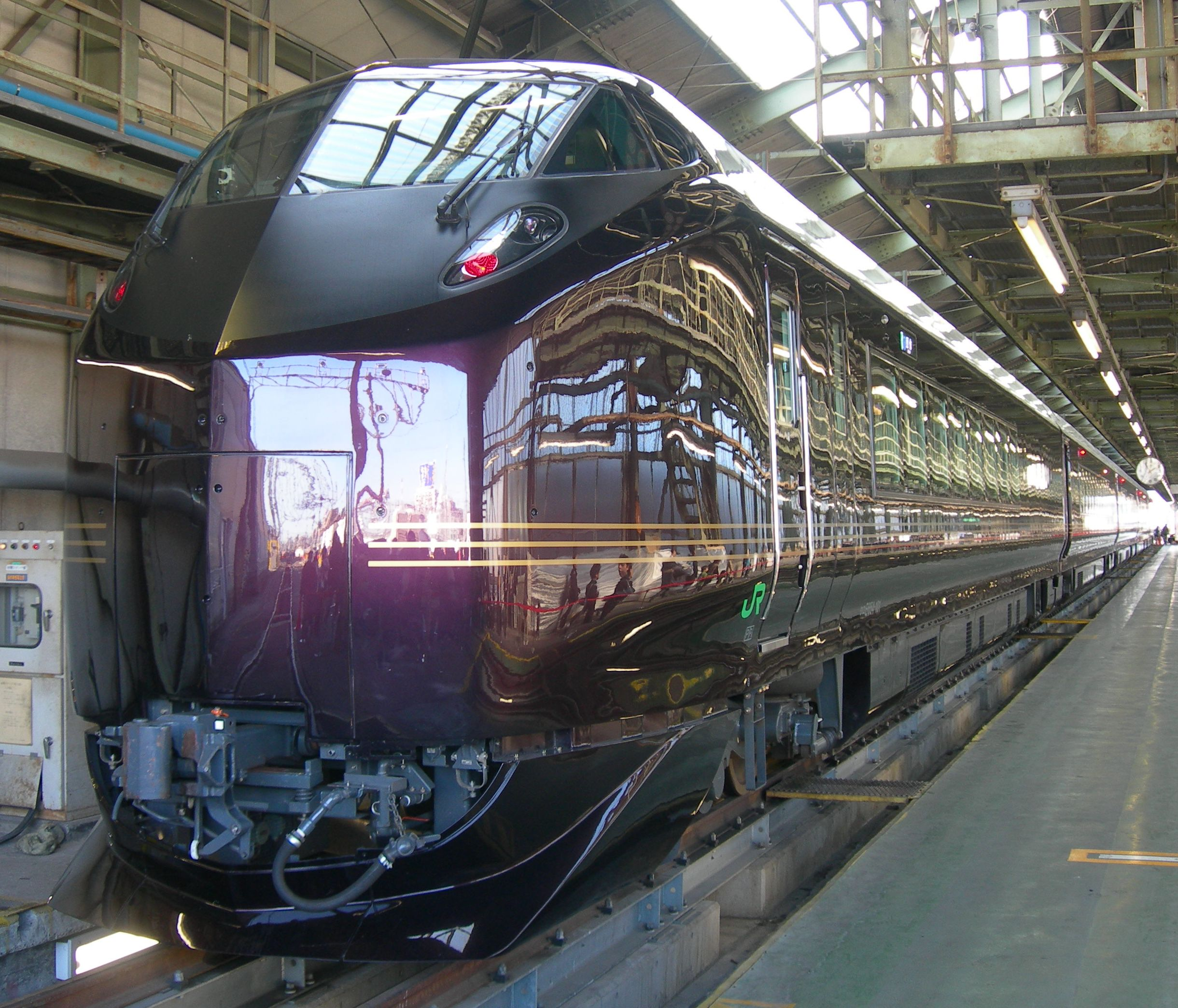 JR東日本E655系電車